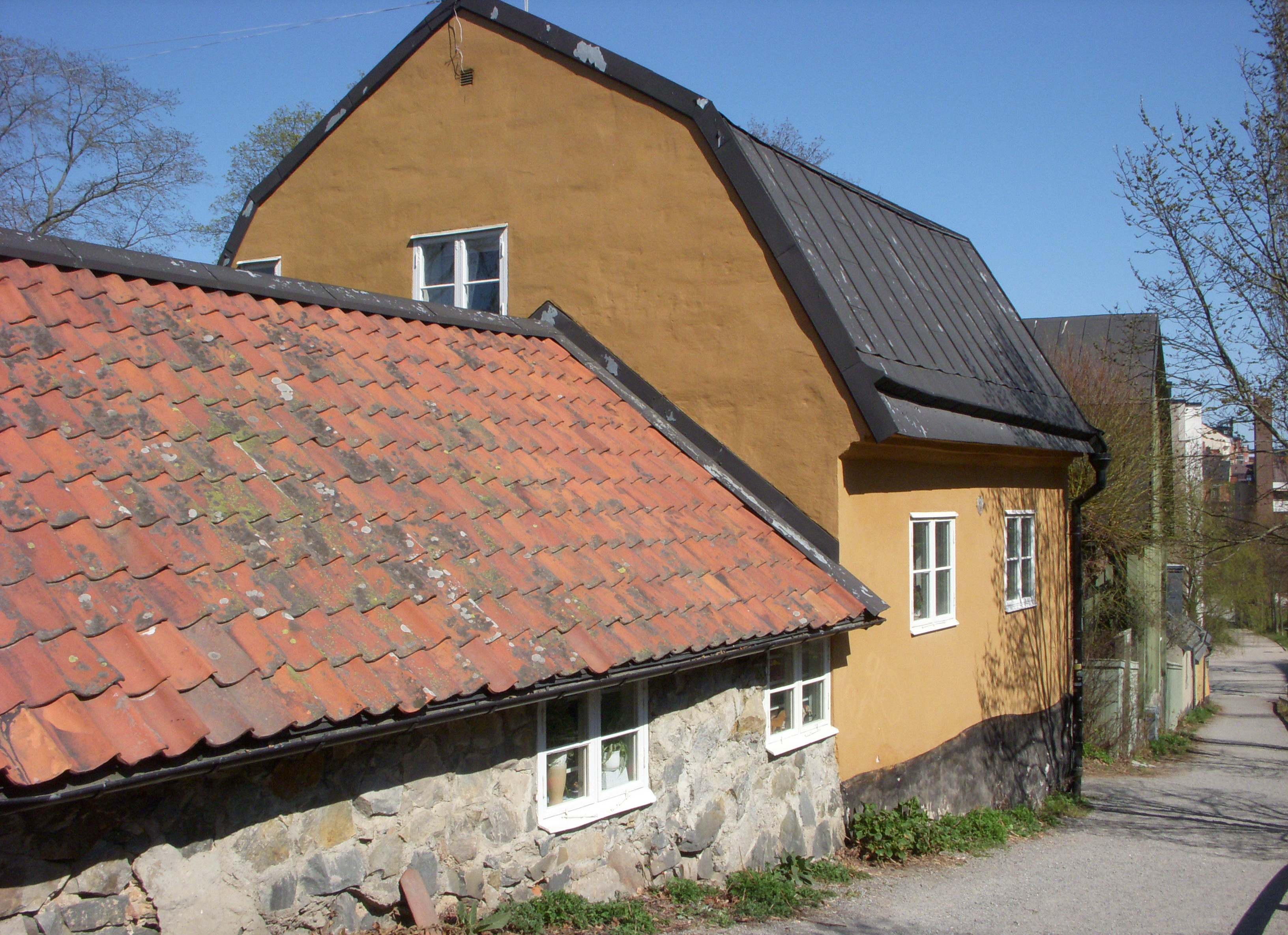 Gamla Lundagatan 8 i fastigheten Haren 6